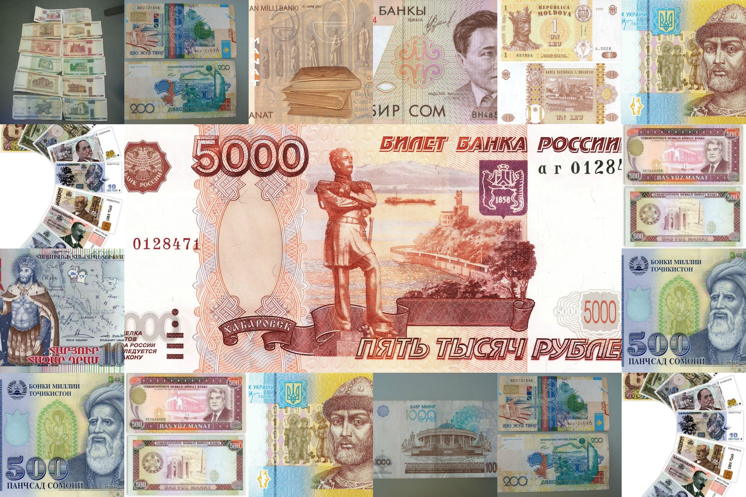 A kép a volt szovjet tagköztársaságok pénznemeit ábrázolja.